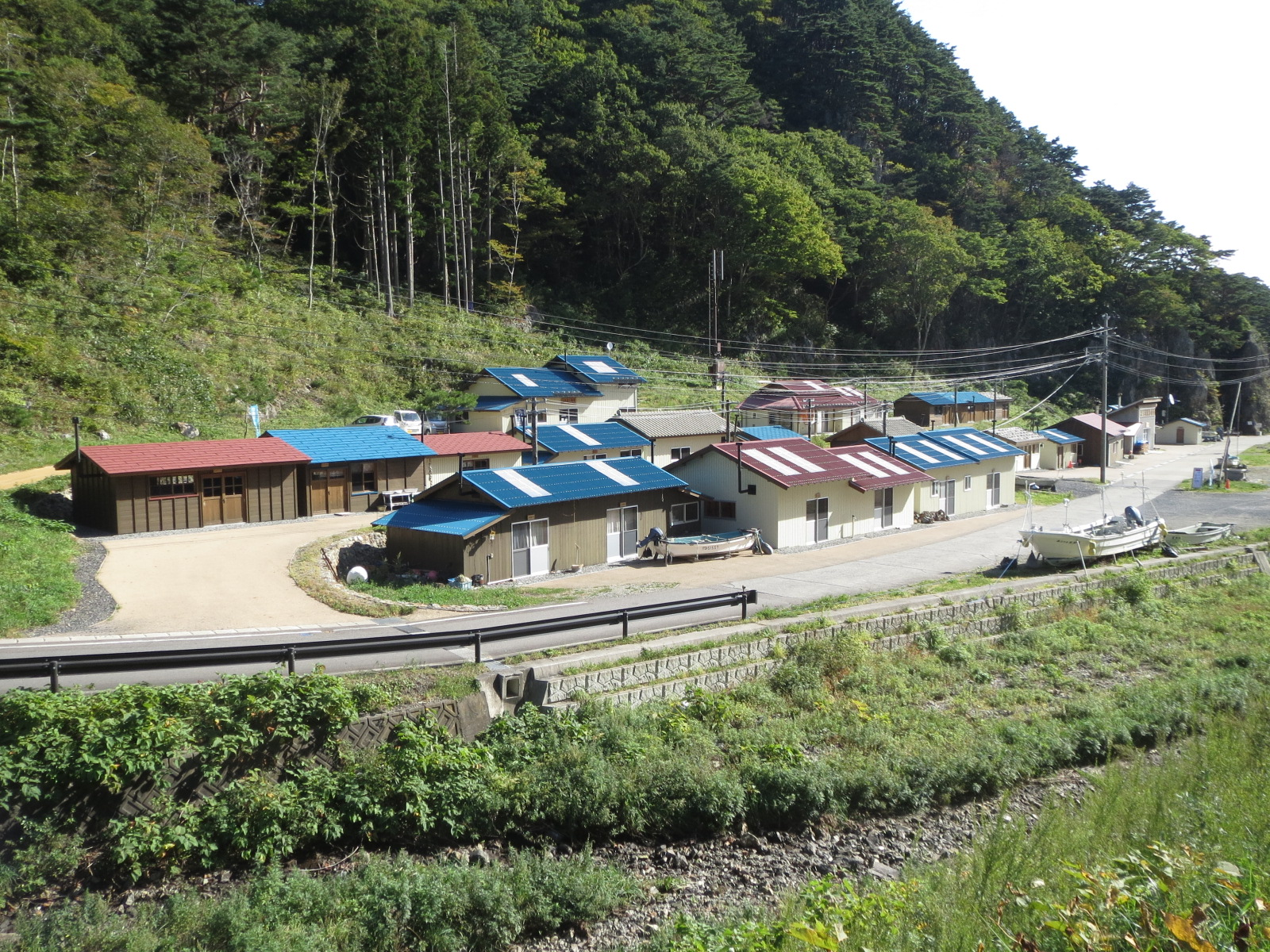 田野畑村にある机浜番屋群